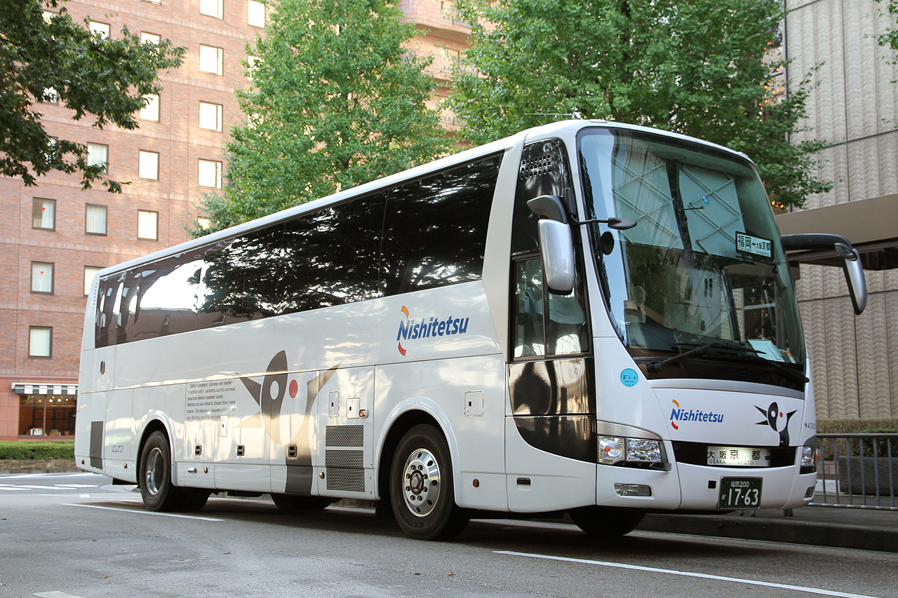 ・登録番号 福岡200か17-63 ・西日本鉄道㈱博多自動車営業所所属 ・夜行高速用車両 ・2012年1月 京都市内にて撮影 ・撮影者 Zondag2000